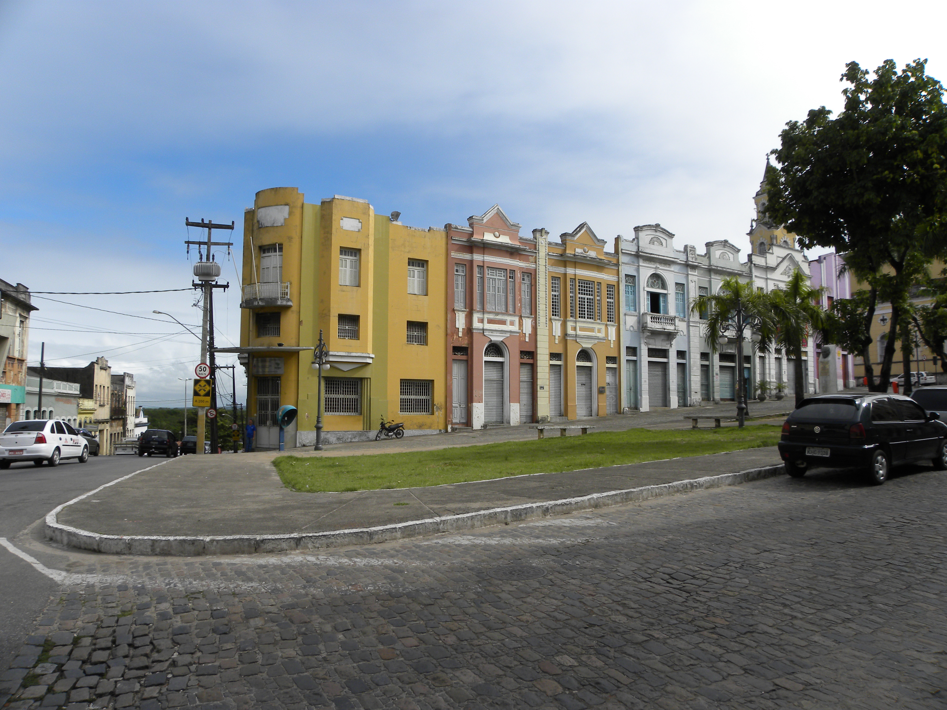 Casarões da Praça Antenor Navarro